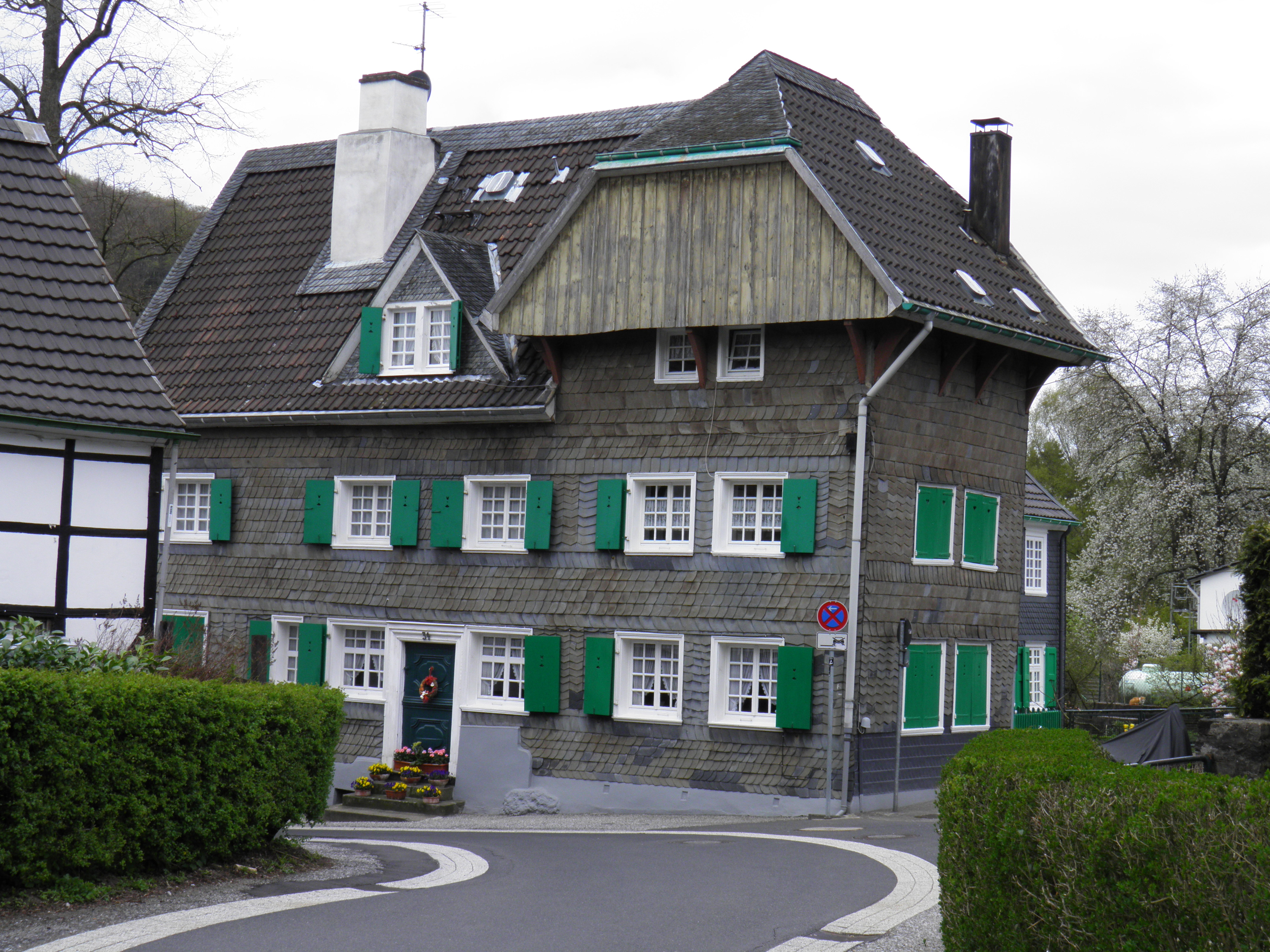 Wehrturm mit Haus Reinshagen in Morsbach